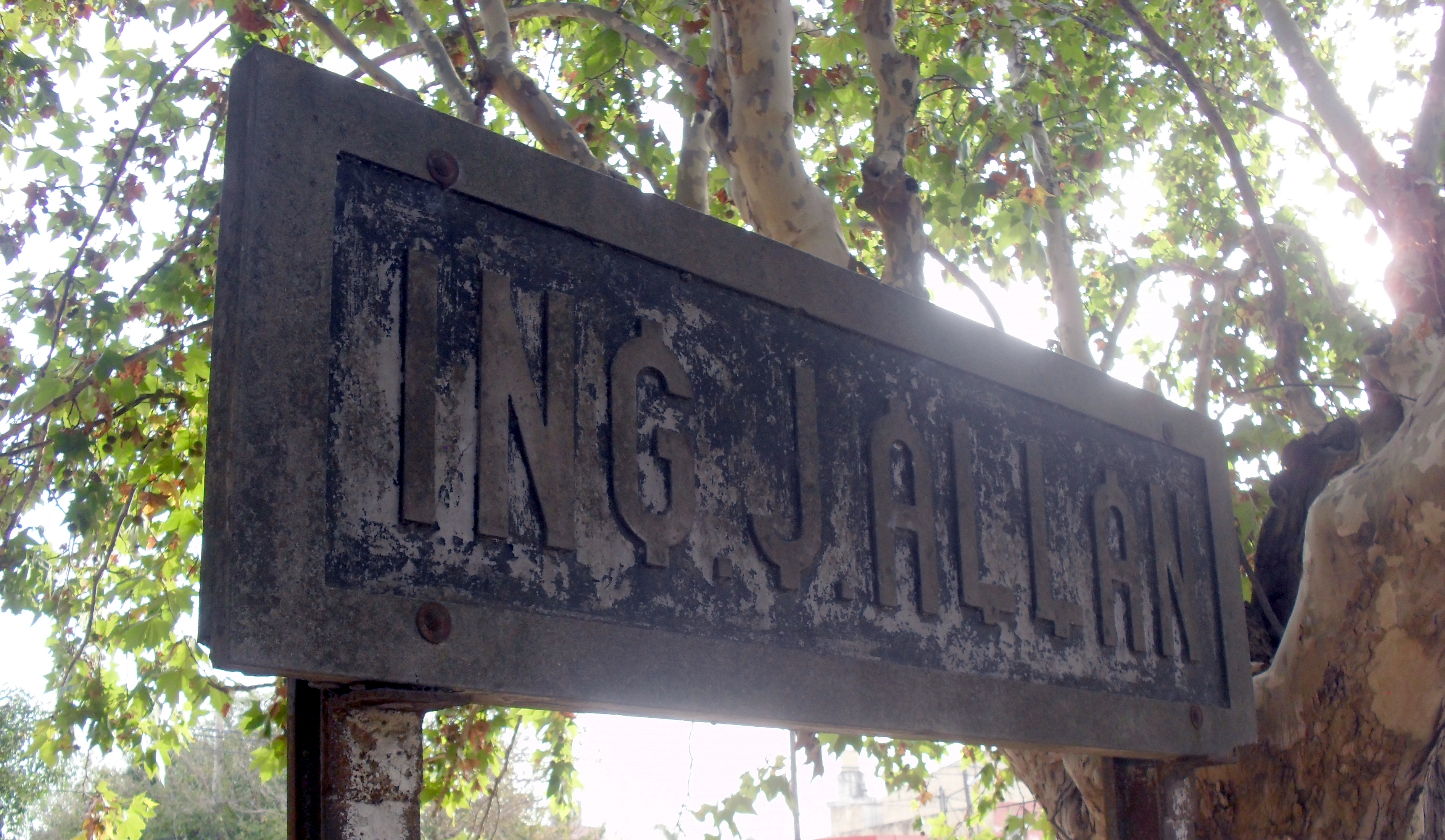 Antigua Estación Ingeniero Allan